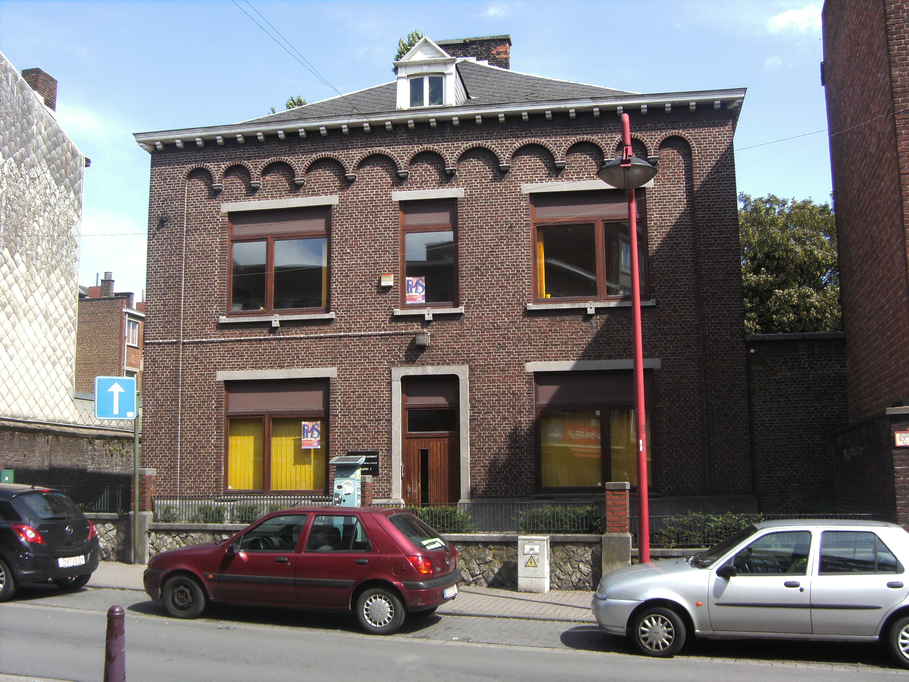 Charleroi (Belgique) - rue de la Régence n° 19 - bâtiments datant de 1818 (?). D'abord bâtiment militaire (services du génie), ensuite local de la Police Judiciaire (1927-1944), finalement centre psycho-médico-social (P.M.S.) de la Province de Hainaut.